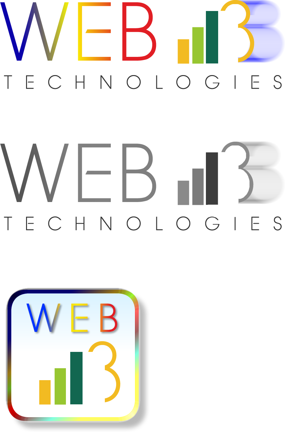 Logo original et icône créés pour illustrer les technologies du web 3.